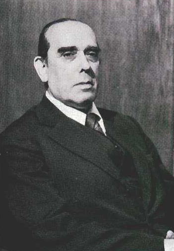 Hugo Rosende Subiabre, ministro de Justicia de Chile durante el régimen militar de Chile.